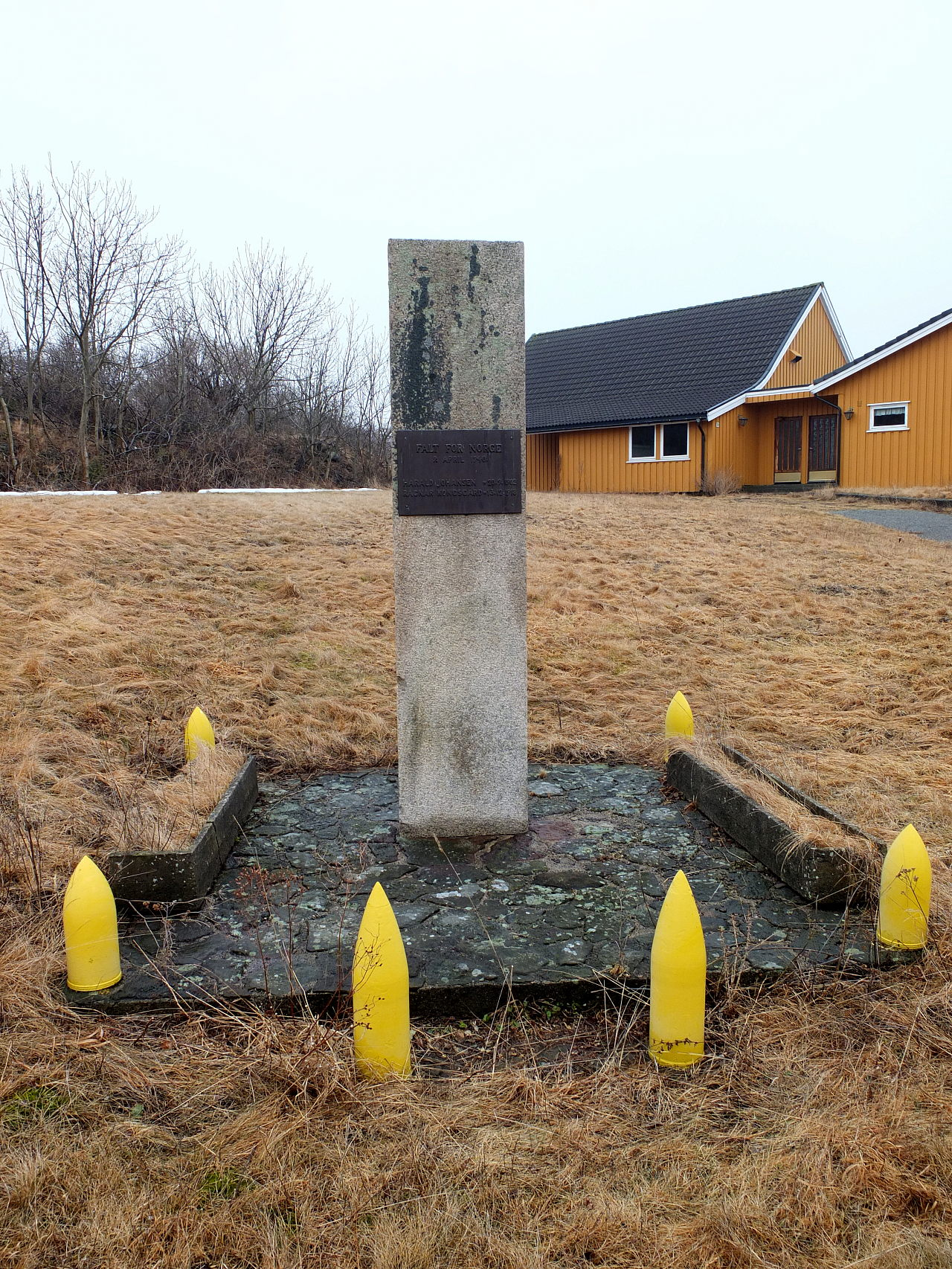 Rauøy fort i Oslofjorden